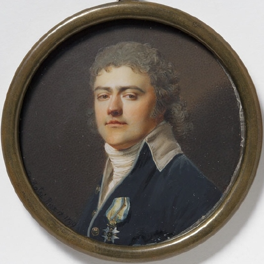 Generallöjtnant Karl Henrik Posse, Född 1767, Död 1843